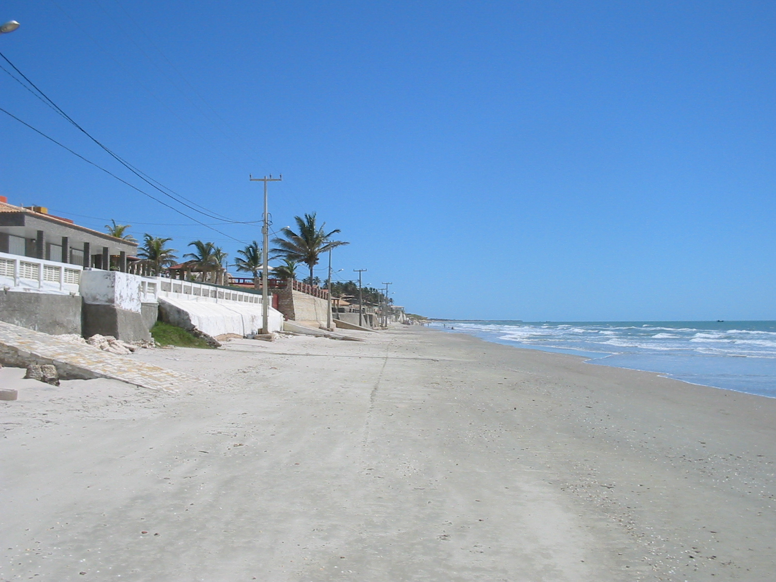 Tibau (Rio Grande do Norte), Brasil. Praias. Beach. Tibau (Rio Grande do Norte), Brazil.